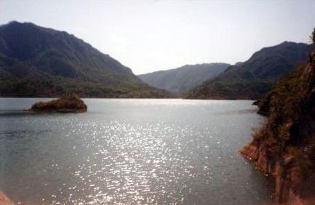 Dique de Olta, en la provincia argentina de La Rioja